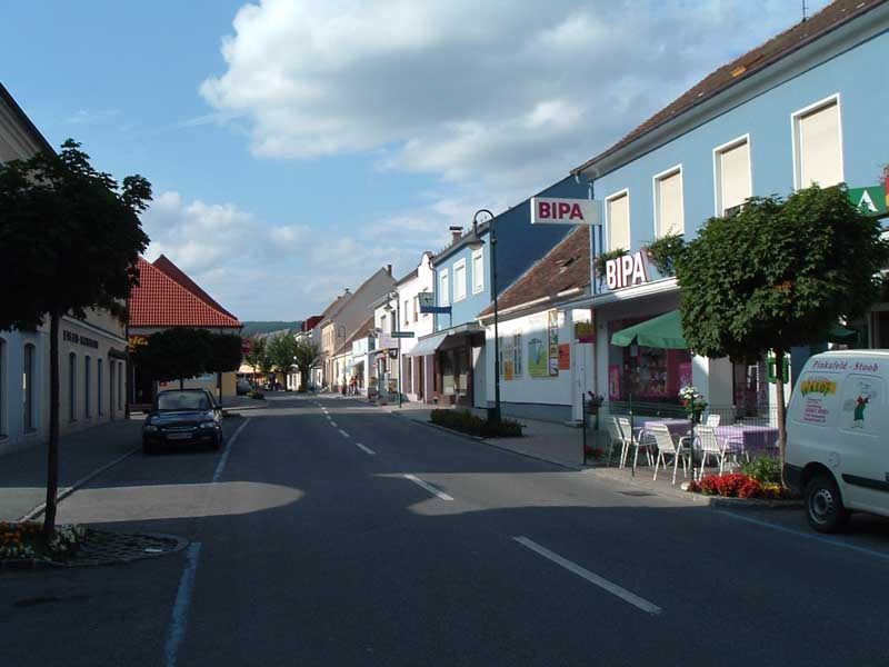 Pinkafő belvárosa (Burgenland, Ausztria)